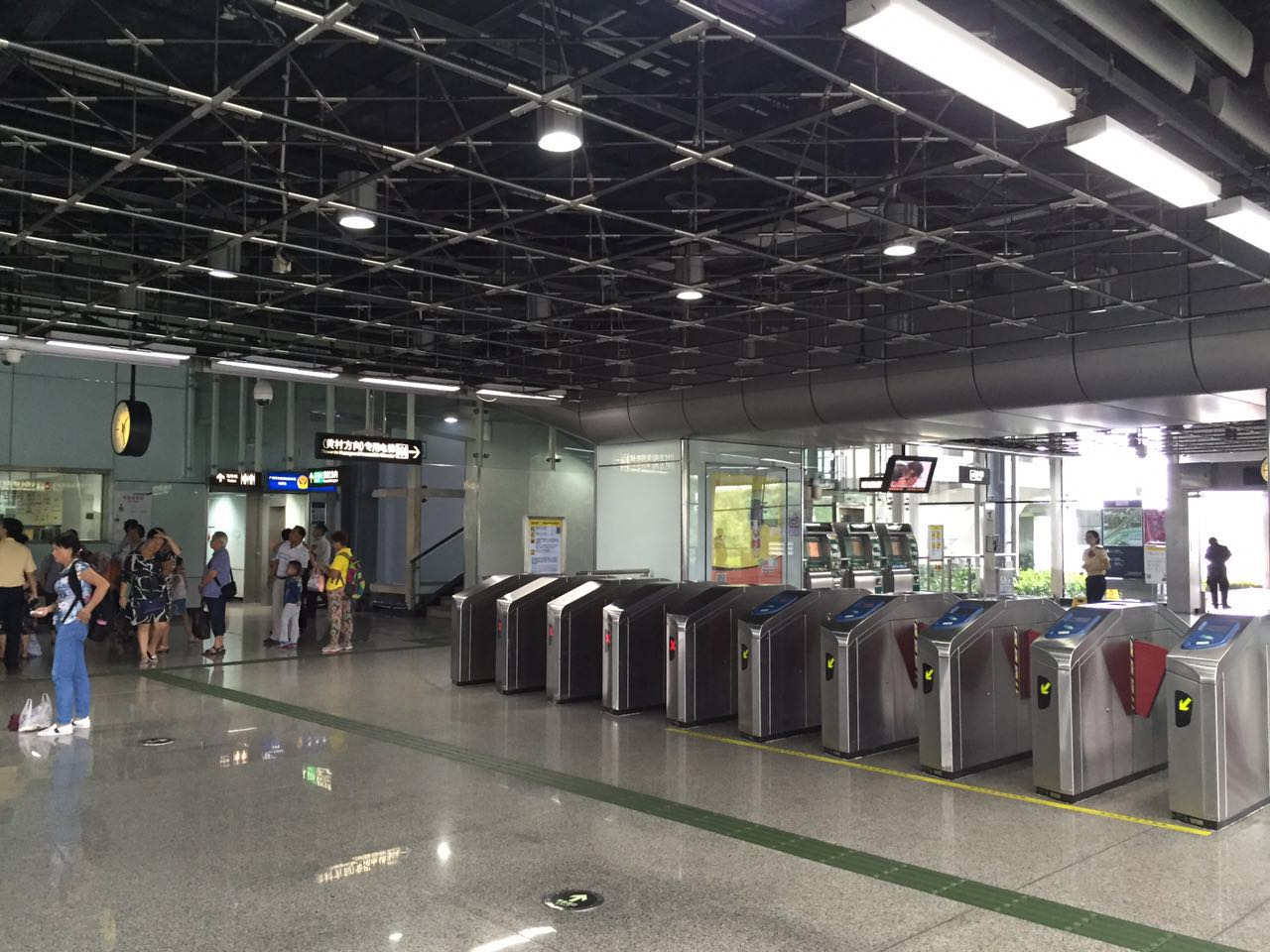 广州地铁低涌站